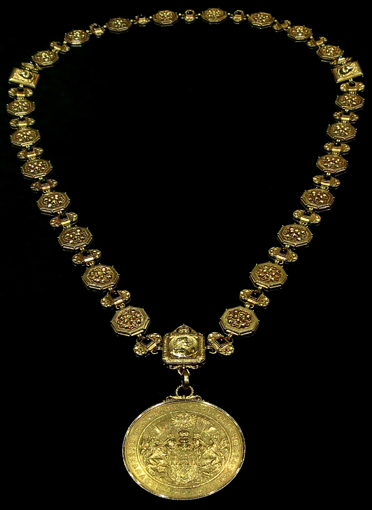 Řetěz primátora hl. m. Prahy z roku 1897.